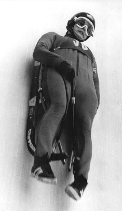 Ute Rührold ADN-ZB Demme 18.12.1971-Oberhof: DDR-Meisterschaften im Rennschlittensport-Im Frauen-Einsitzer liegt Ute Rührold (SC Traktor Oberwiesenthal-Foto) nach zwei Durchgängen mit einer Gesamtfahrzeit von 1:41,173 min in Führung.